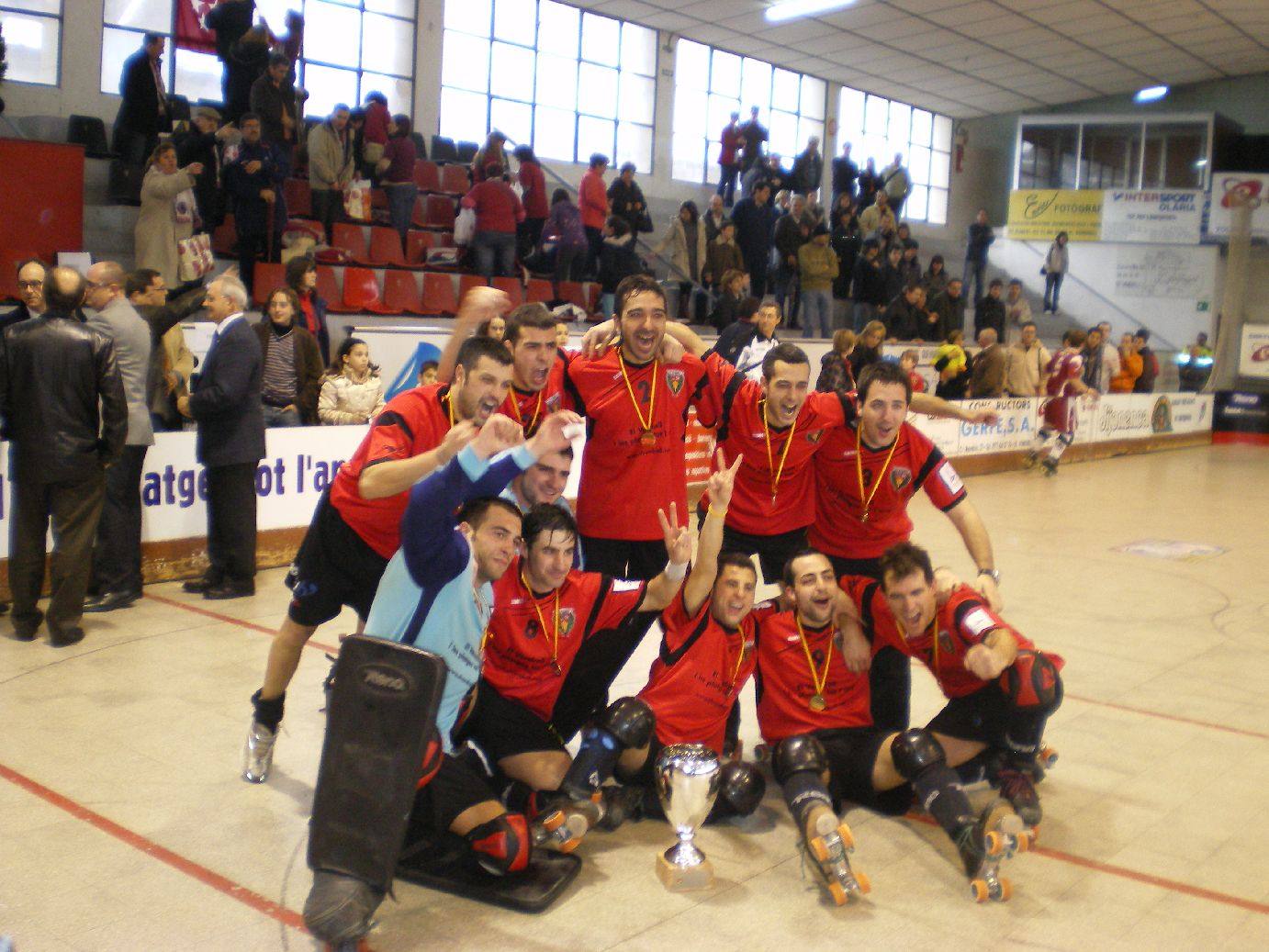 Equip d´hoquei patins del C.E. Vendrell desprès de guanyar la final de la Copa del Príncep : 1-febrer-2009